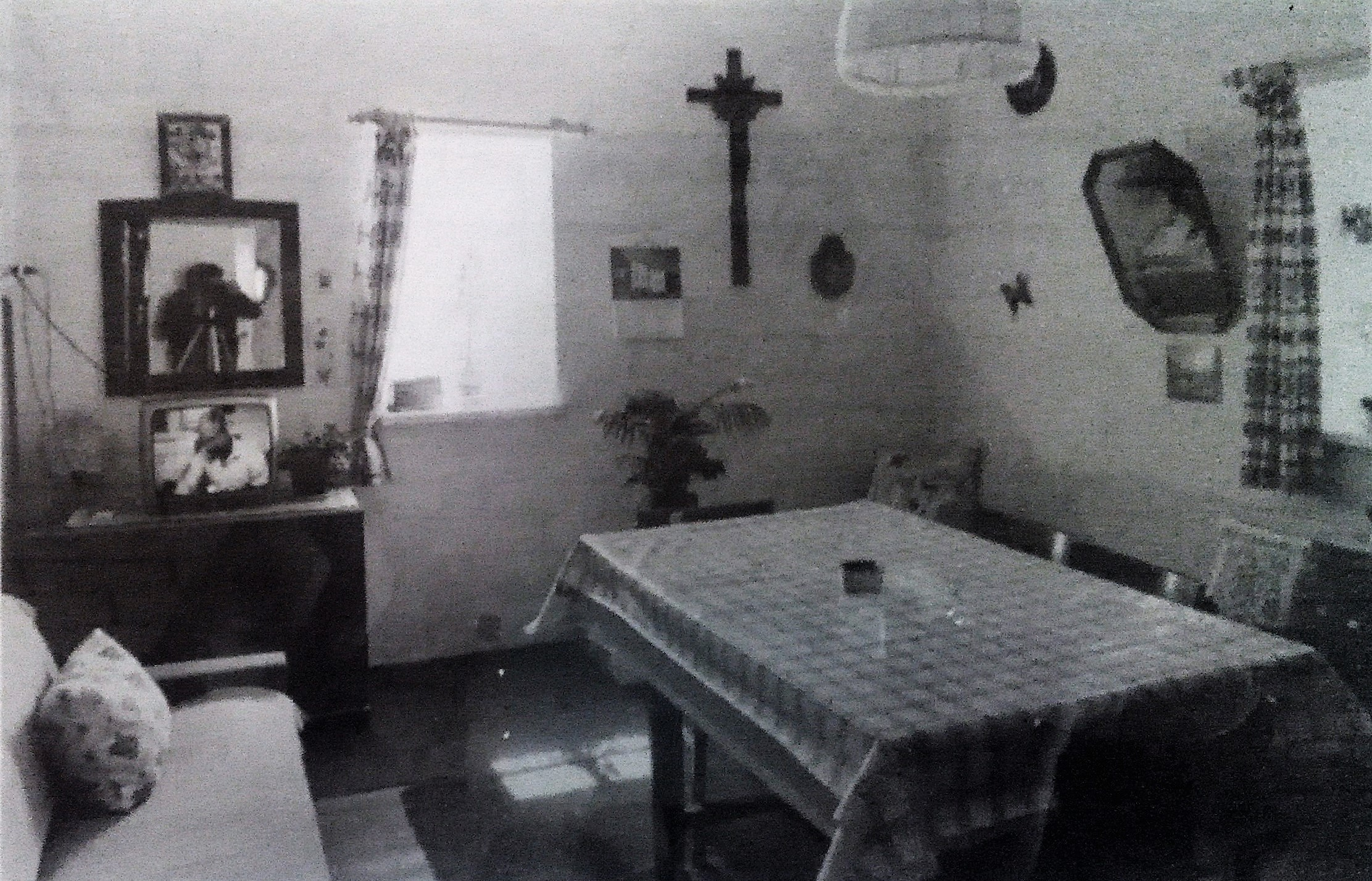 Mules - Alloggio guardiano